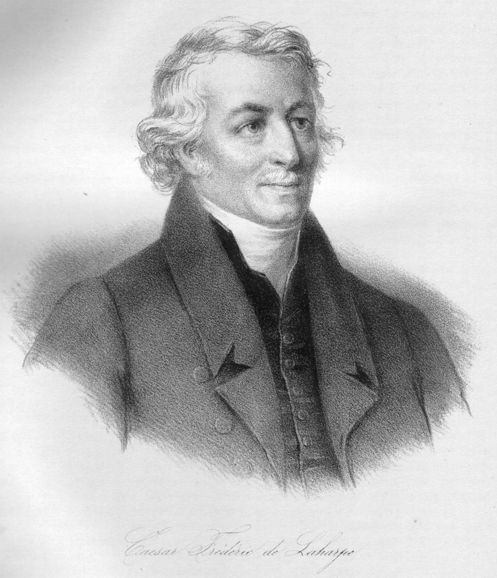 César-Fréderic de Laharpe (*1754; †1838), Schweizer Politiker, Erzieher von Zar Alexander I.